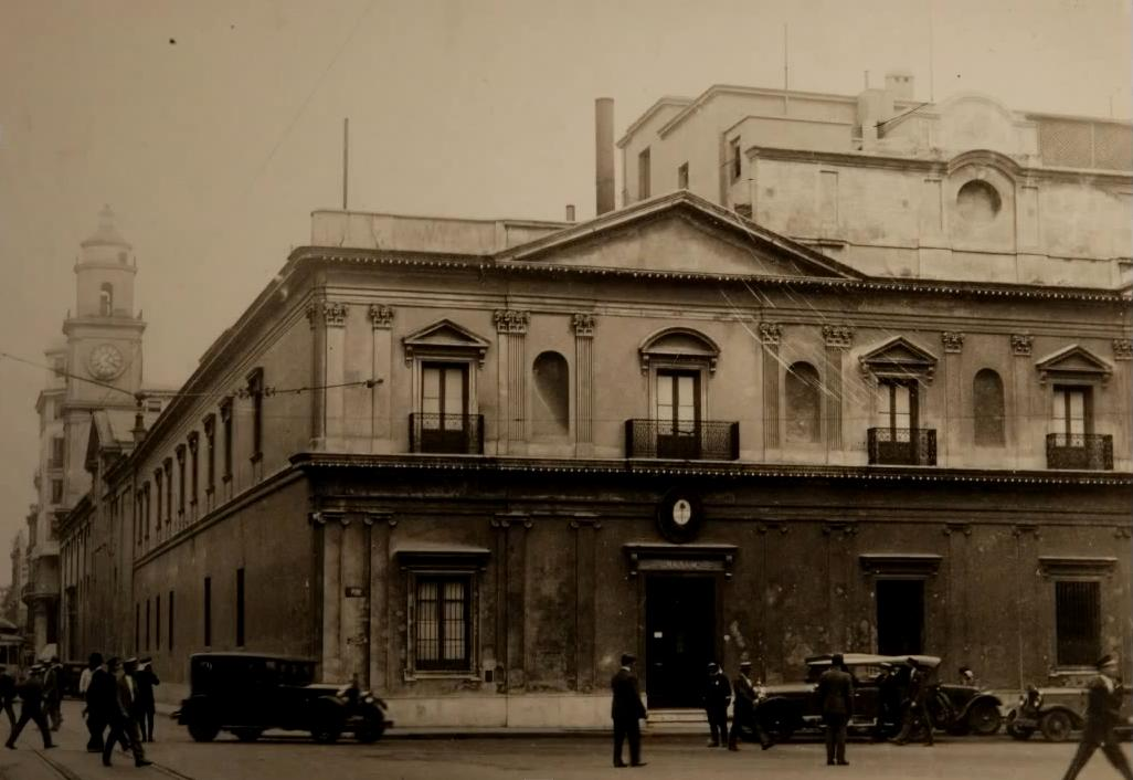 Edificio de las antiguas Procuraduría Jesuítica en Buenos Aires, parte de la llamada Manzana de las Luces. En esta imagen se ve su aspecto original, antes de la apertura de la Diagonal Sur, para la cual se demolió una parte de la esquina.